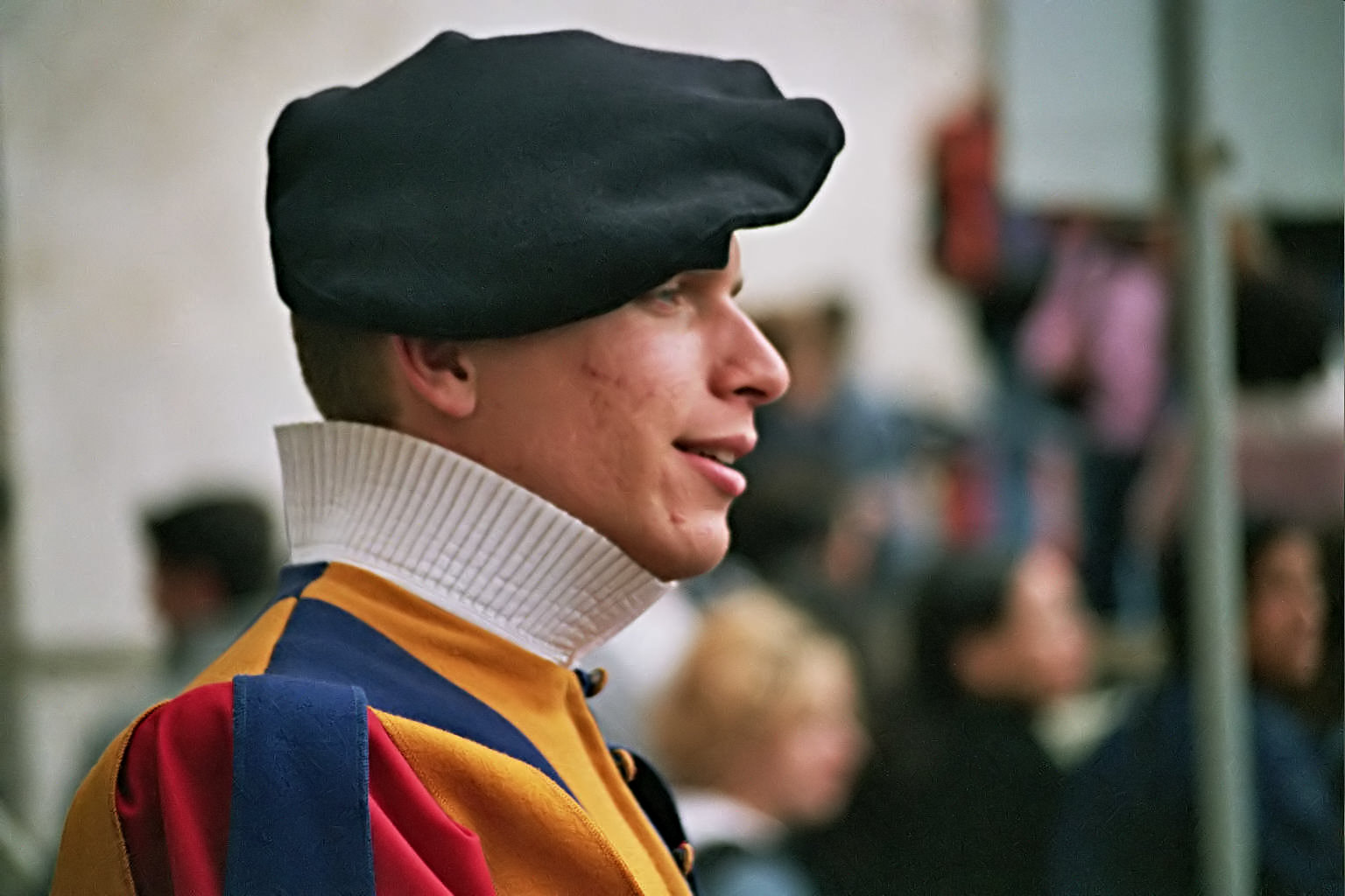 Guardia Svizzera Pontifica (particolare)